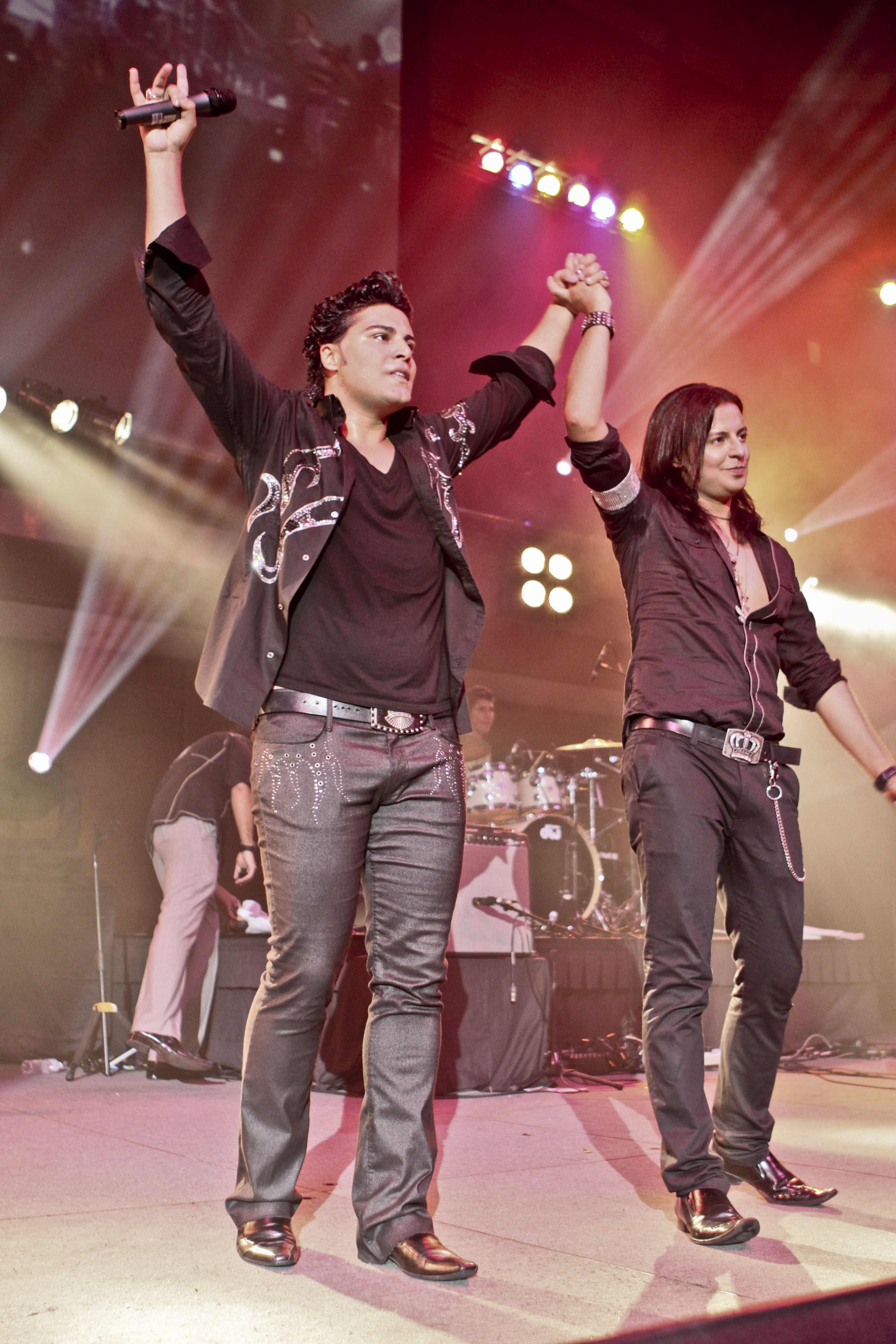 Kamran and Hooman concert Malaysia 2010 Kuala Lumpur